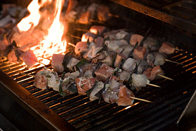 Skewers